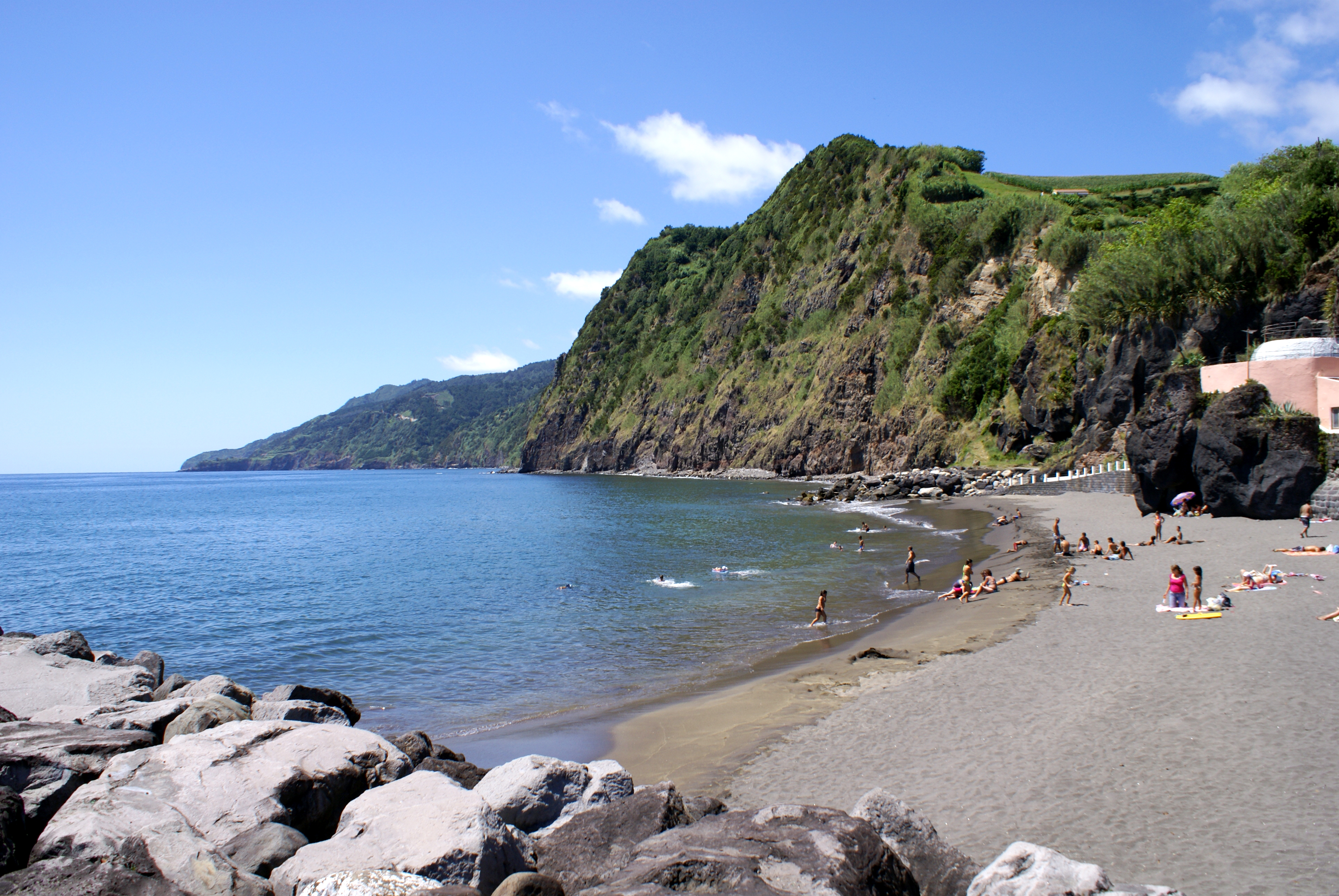 Praia da Povoação, Povoação, ilha de São Miguel, Açores